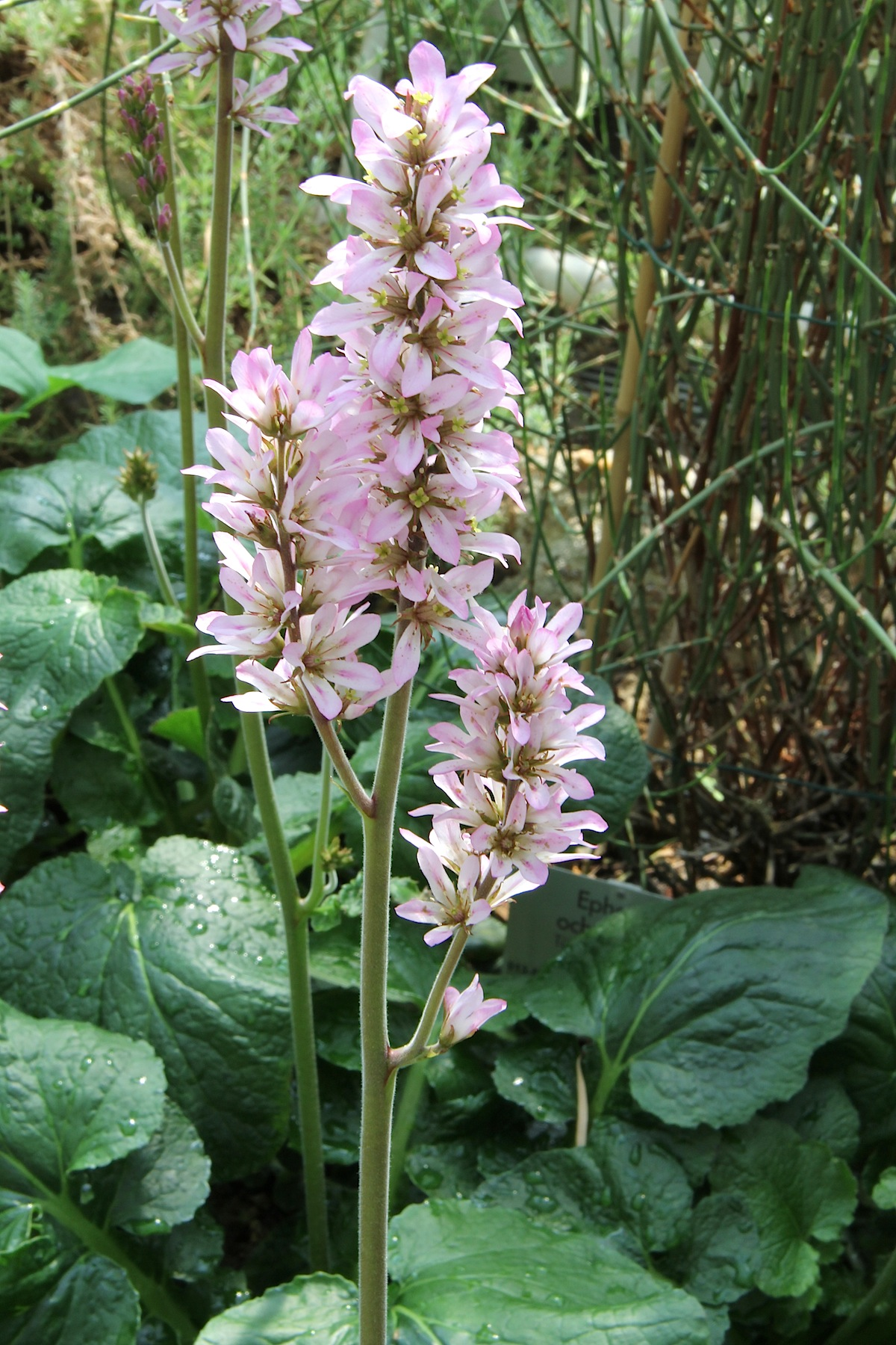 Francoa appendiculata